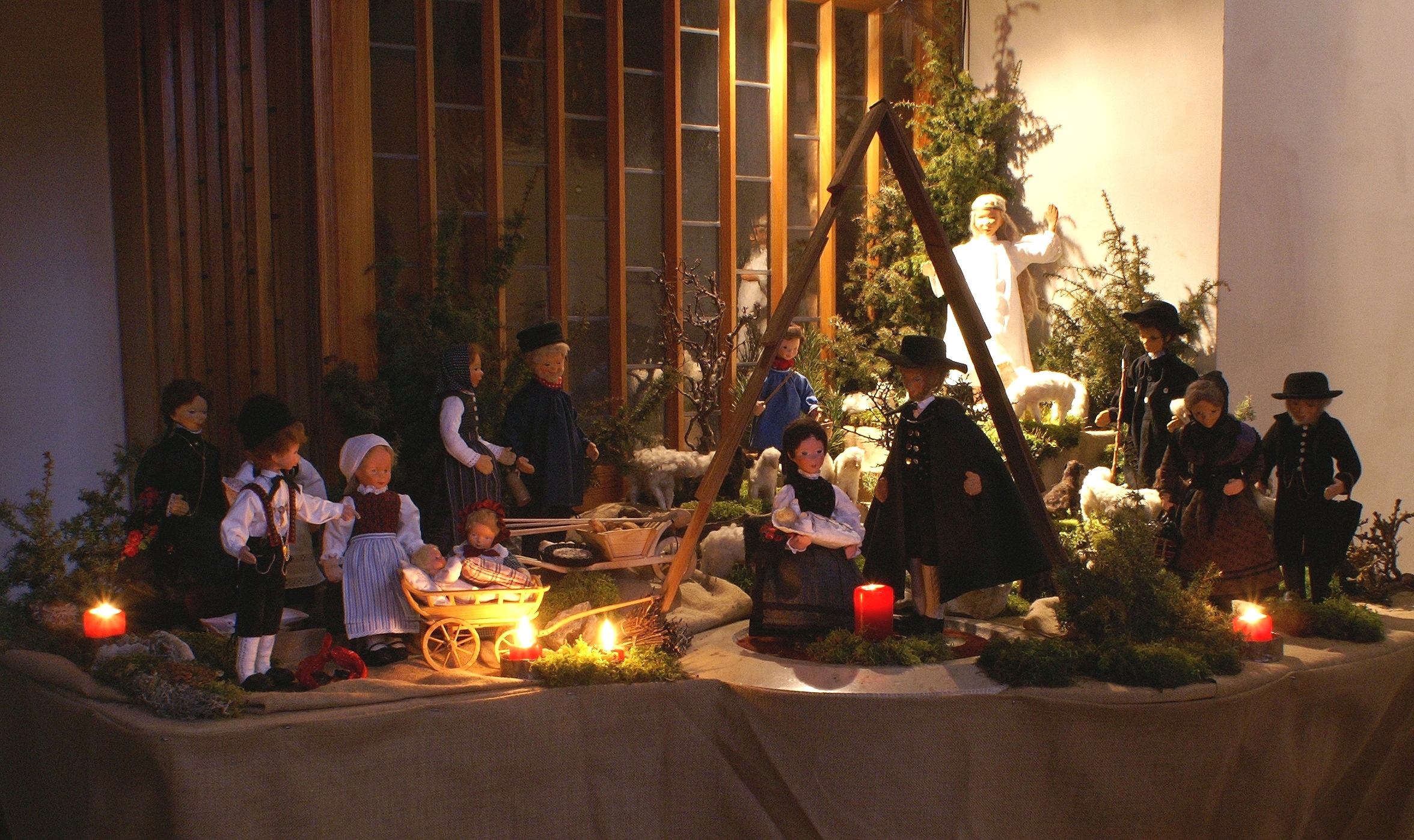 Die Seißener Trachtenkrippe wird alljährlich kurz vor Weihnachten in der Nikolauskirche aufgebaut und mit Naturmaterialien aus der Region dekoriert. Bis zum 6. Januar kann sie dann immer an Sonn- und Feiertagen von 14.00 bis 16.00 Uhr besichtigt werden.